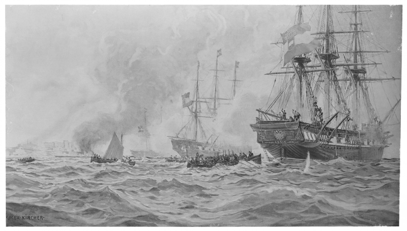 Kampf einer österreichischen Schiffsdivision gegen marokkanische Korsaren bei El Araisch am 2. Juni 1829.